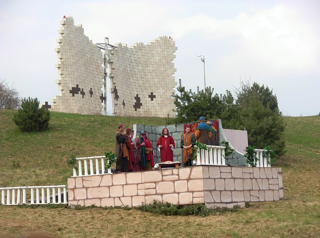 Misterium Męki Pańskiej w Bydgoszczy-Fordonie 2011